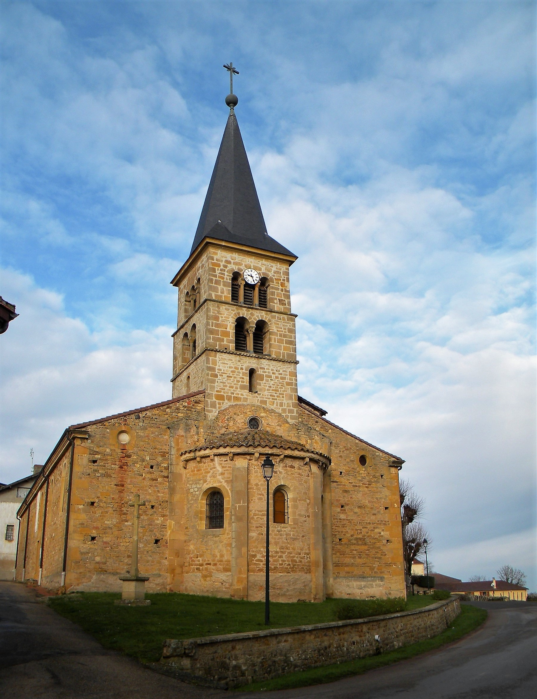 Fleury-la-Montagne, l'église